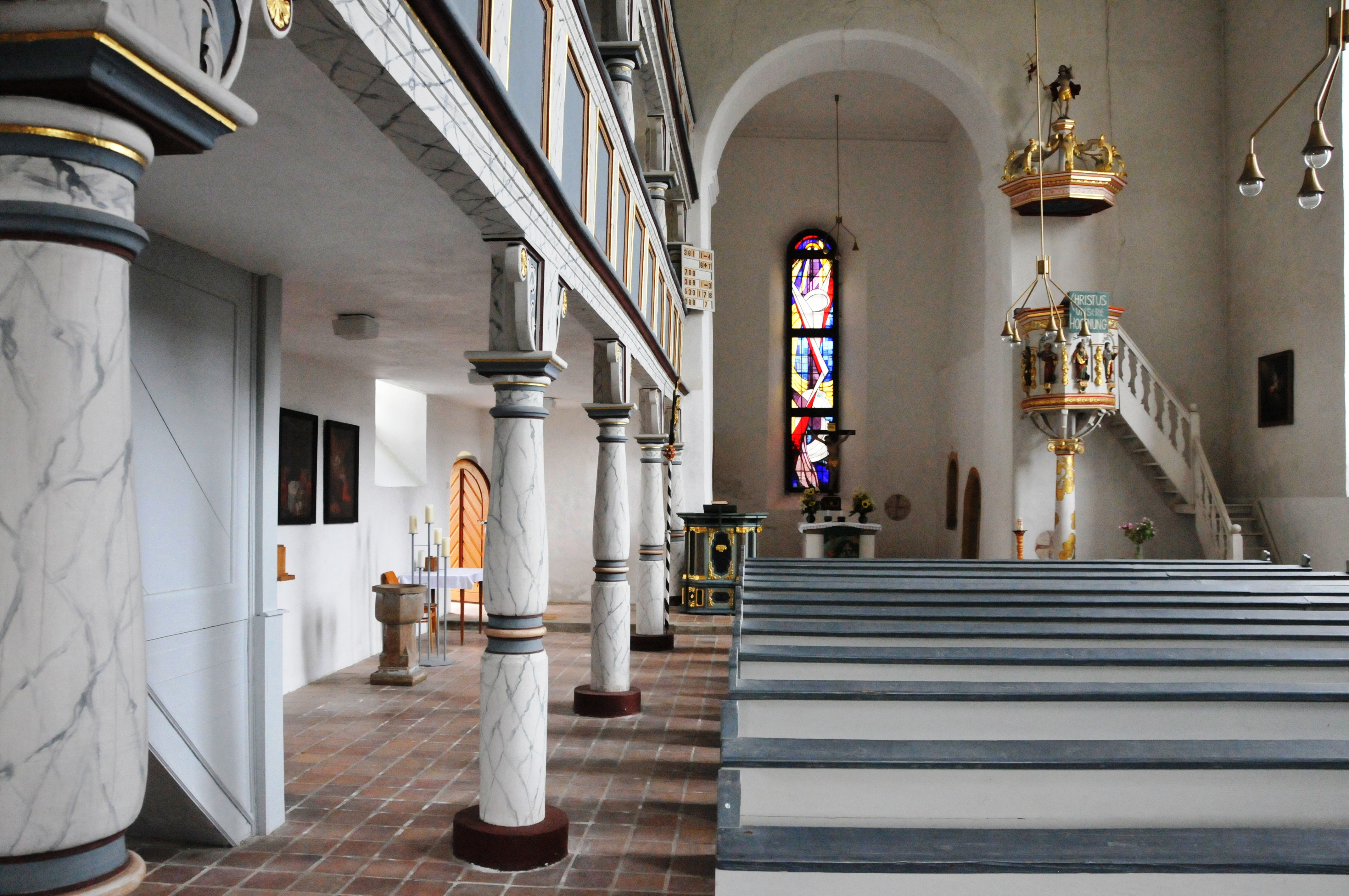 Queienfeld, Kirche